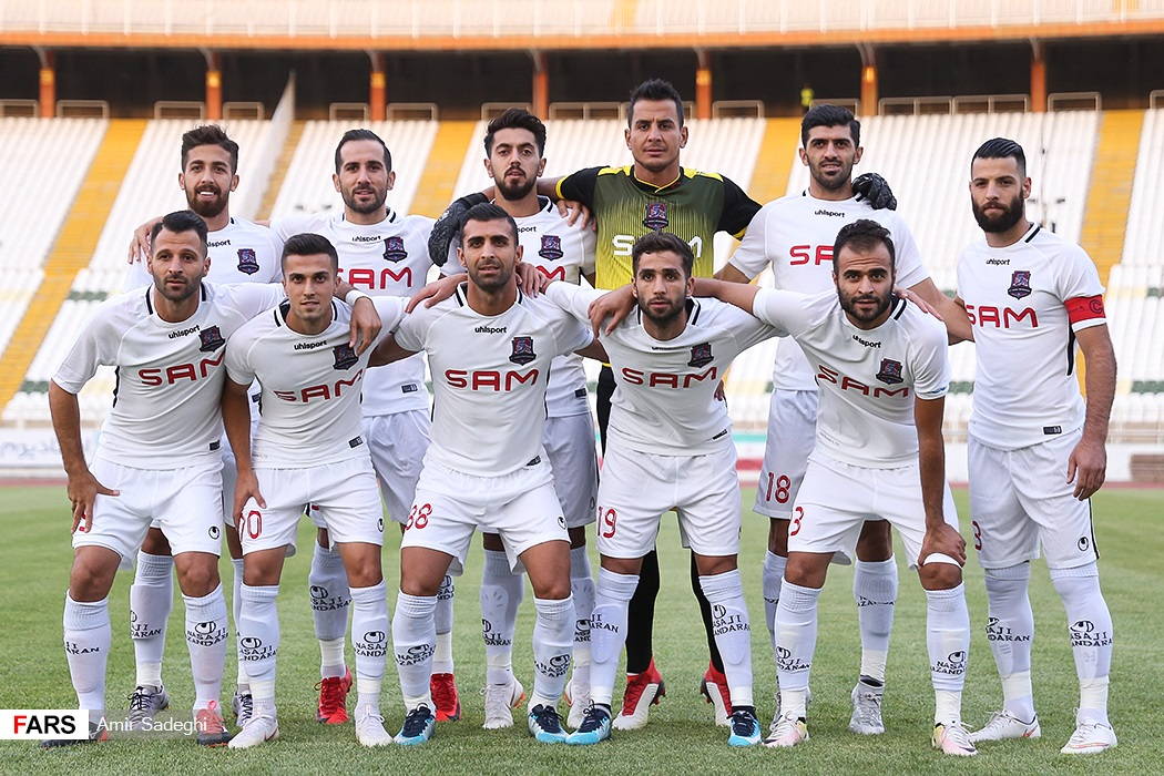 مازِرونی: نساجی فوتوال تیم